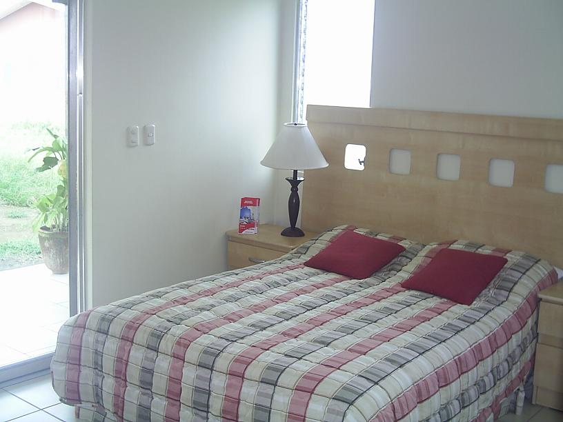 Sala, Comedor, Cocina con acabados en granito, Area de lavanderia, 3 habitaciones, 2 baños, Amplia Terraza, Puertas con acabados finos de vidrio, Ventanas Francesas. Construccion 87mts2 Lote 392 vrs2.